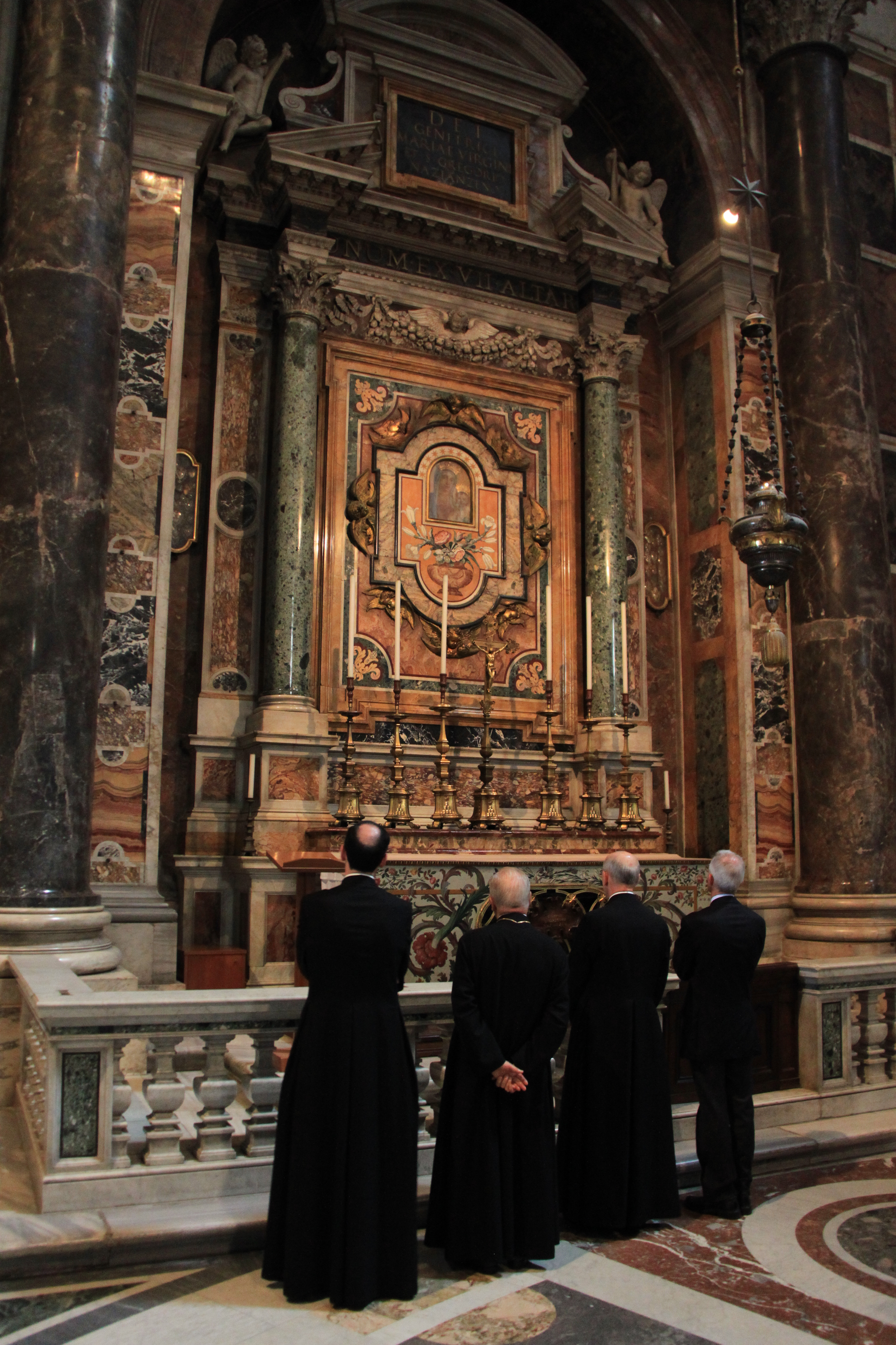 April 2010